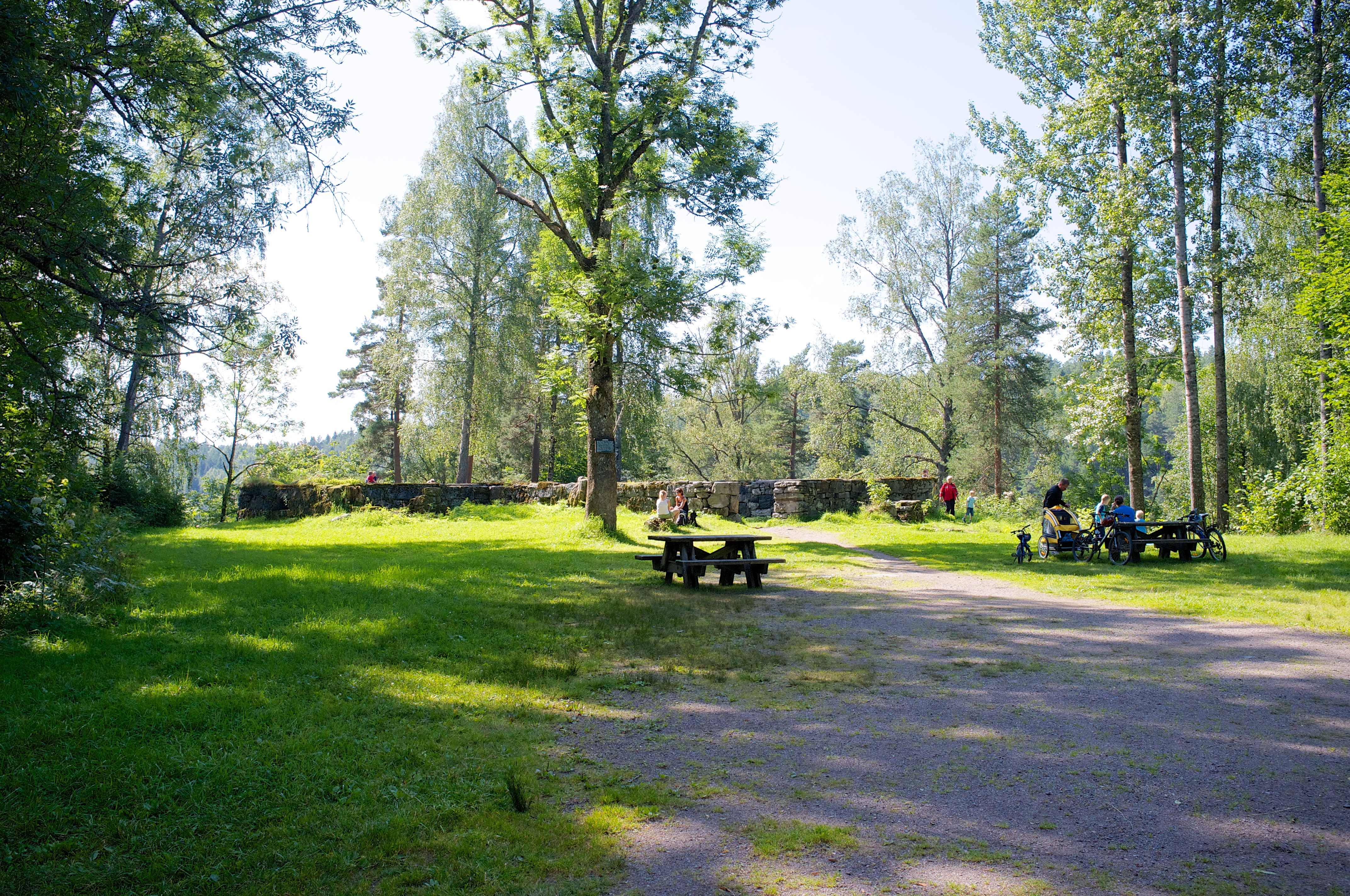 Fra Sarabråten i Østmarka.